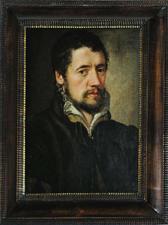 Bild des Bildhauers Alexander Colin (1527-1612) aus der Silbernen Kapelle in der Innsbrucker Hofkirche